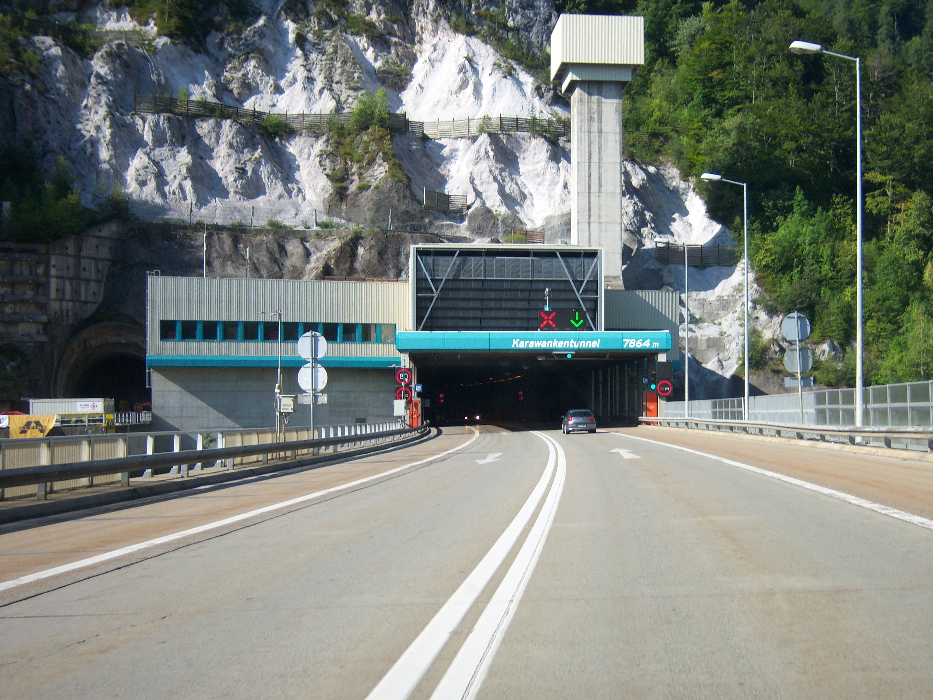 Karawanken Autobahn A11 Richtung Ljubljana vor dem Nordportal des Karawankentunnel